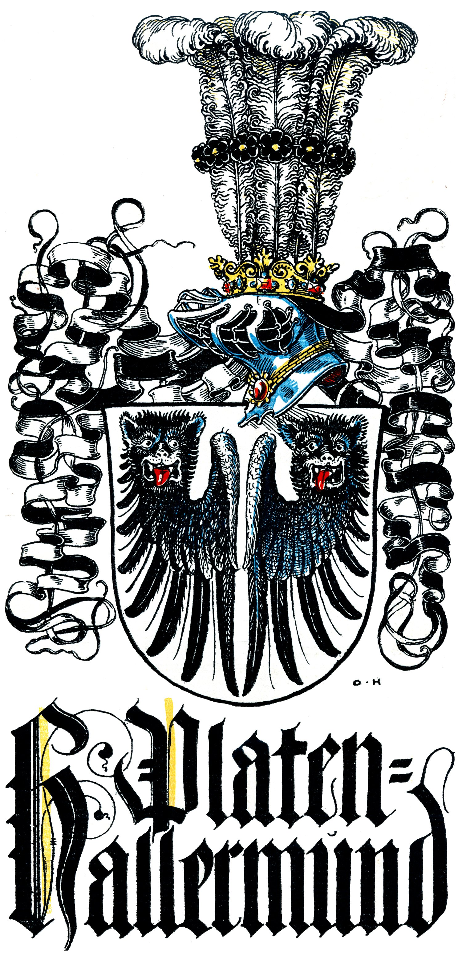 Wappen derer von Platen